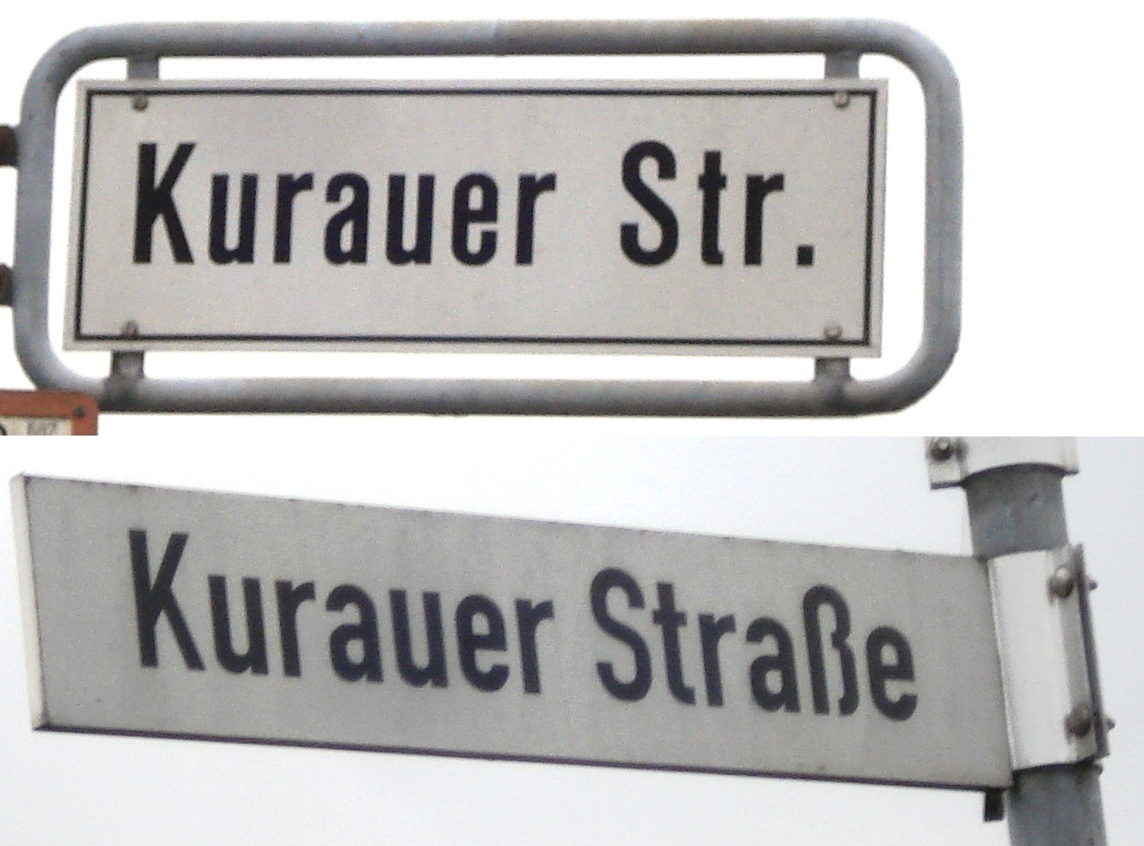 Strassenschild_Kurauer-Straße_(in_Luebeck)